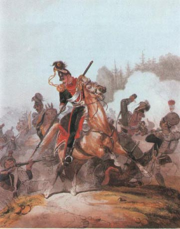 k.k. Ulanen-Regiment Nr. 1 Mitte des 19.Jahrhunderts